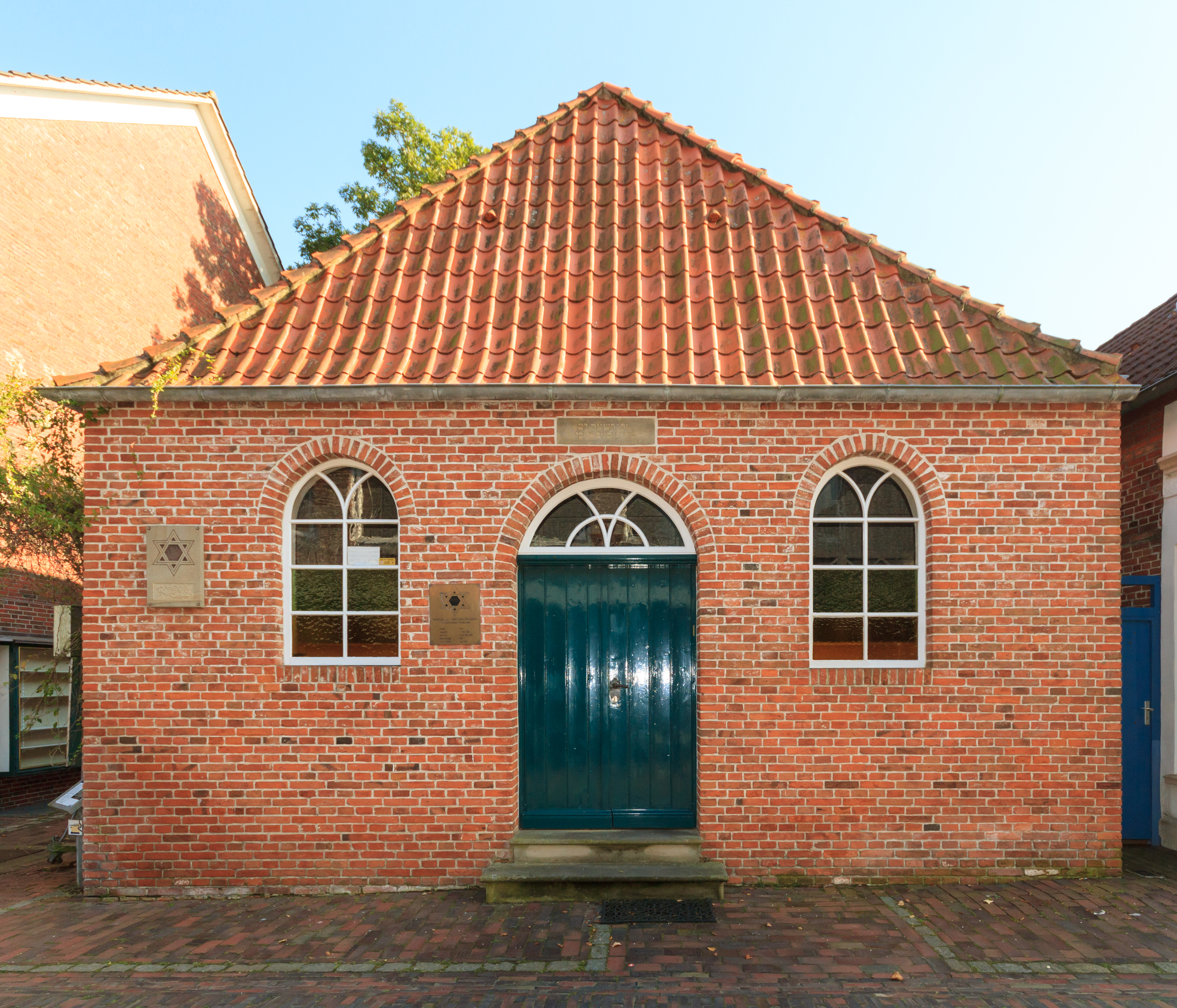 Synagogue (Dornum)